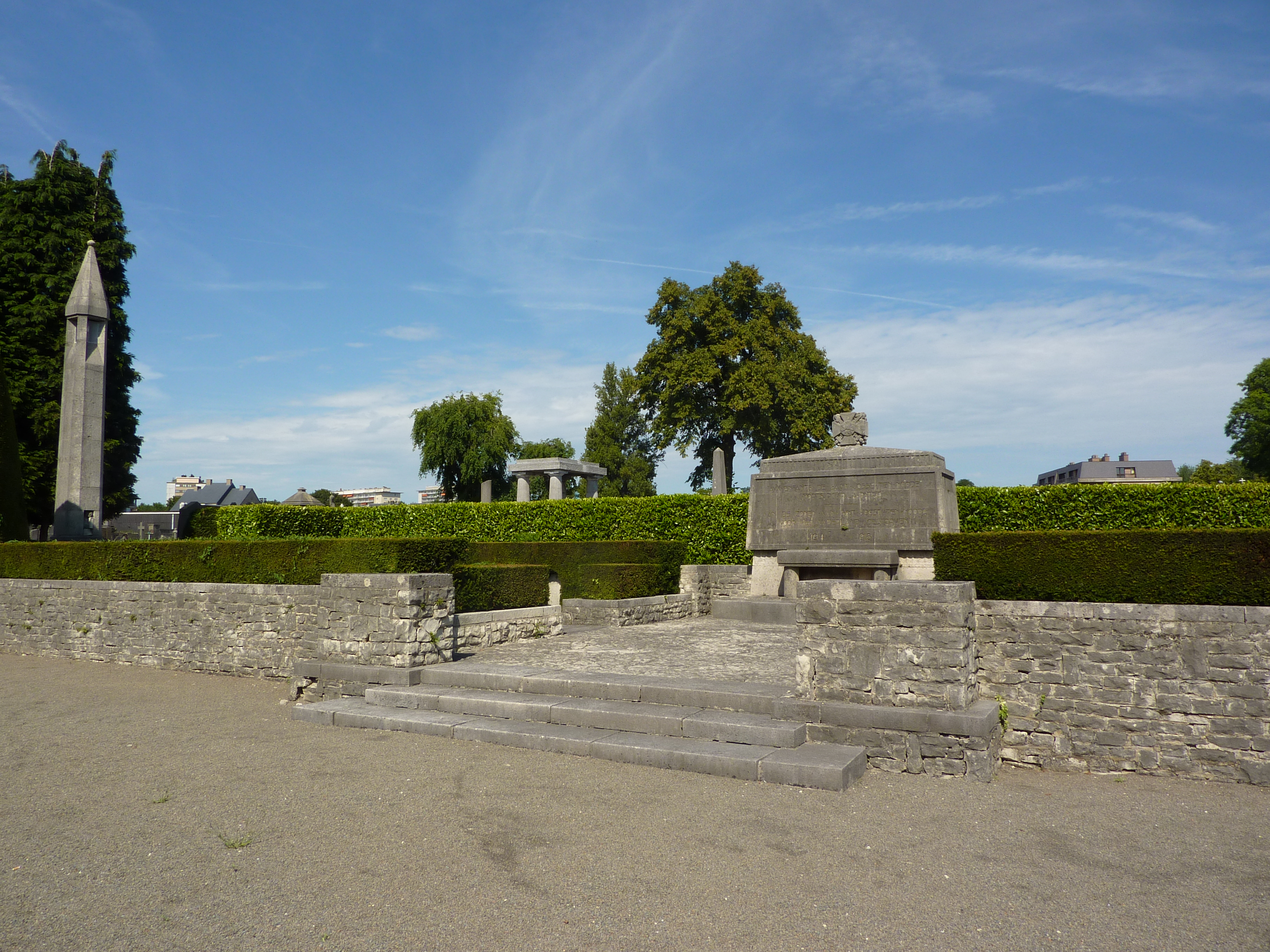 Monument aux morts de la Première Guerre mondiale au cimetière de Saint-Josse-ten-Noode à Schaerbeek, Bruxelles, Belgique.